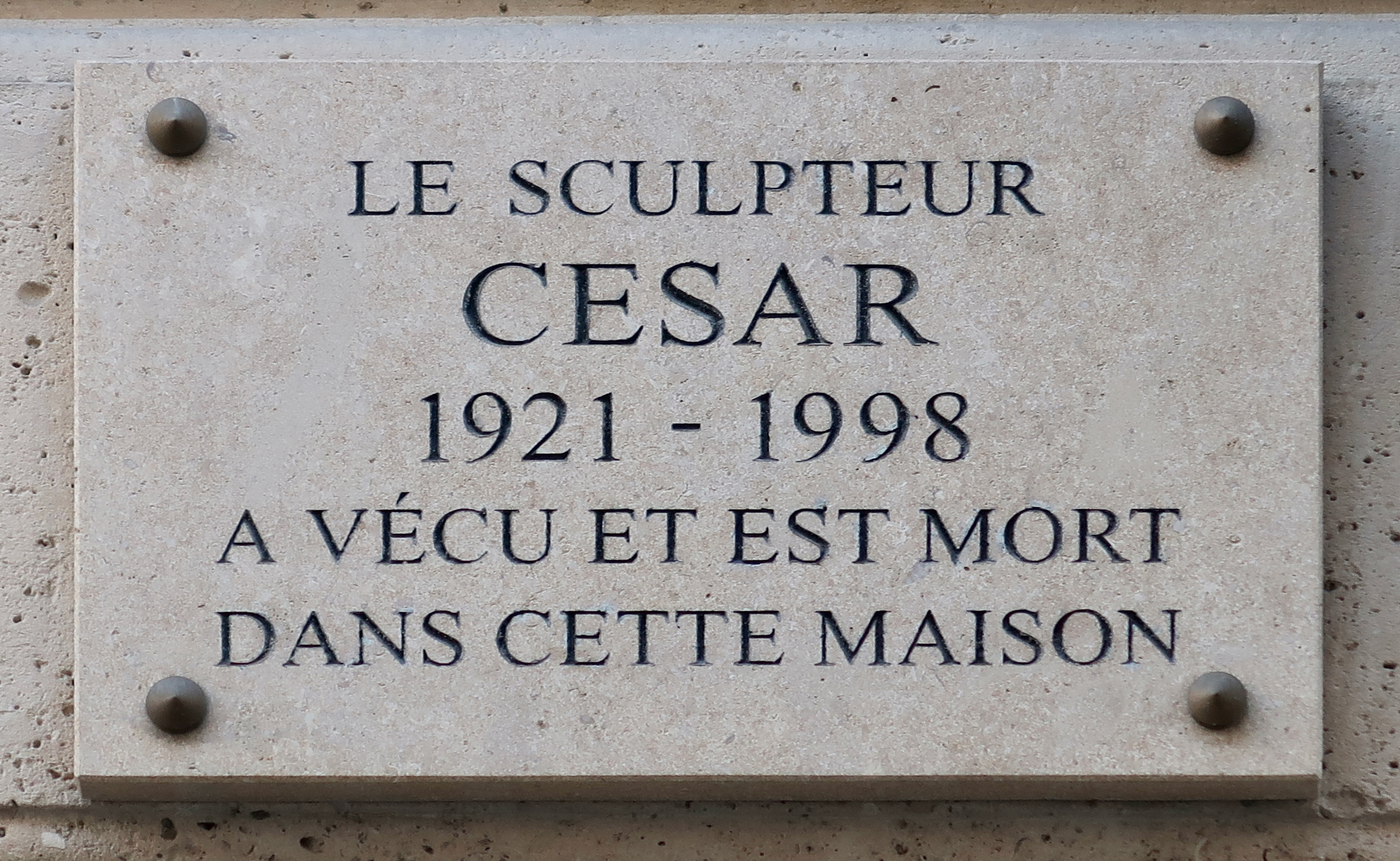 Plaque en hommage au sculpteur César, 9 rue de Grenelle (Paris, 7e).